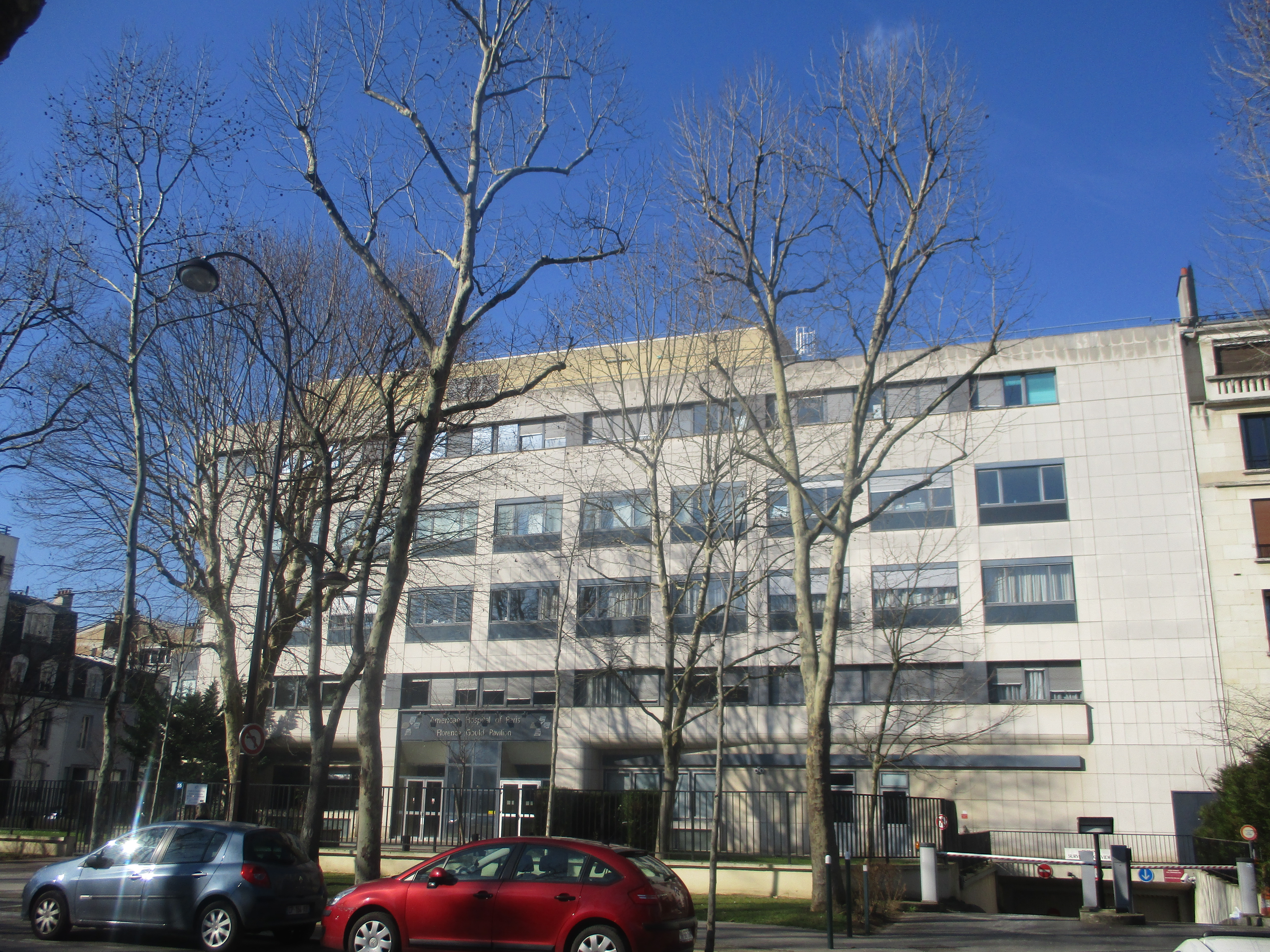 Annexe Florence-Gould de l'hôpital américain de Neuilly-sur-Seine, boulevard du Château.